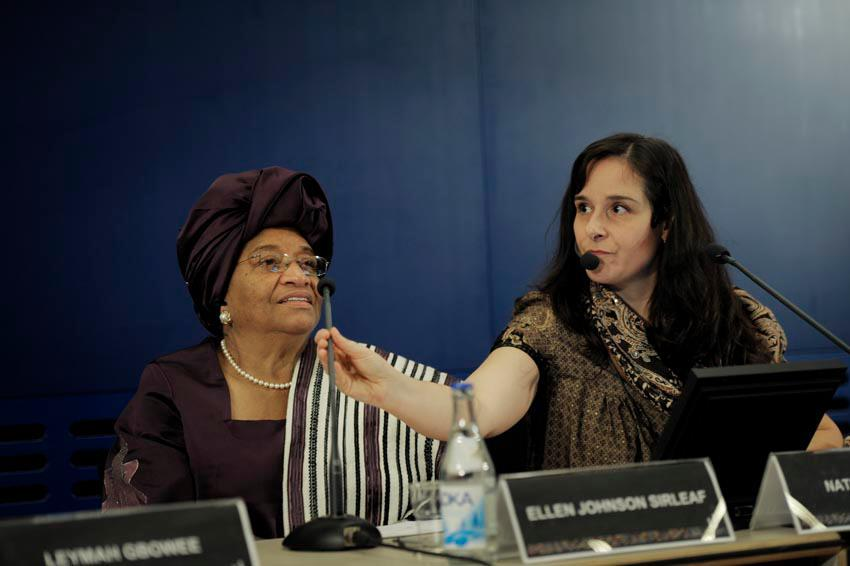 Nathalie Beser modererar ett samtal med nobelpristagaren Ellen Johnason Sirleaf på Utrikespolitiska institutet.